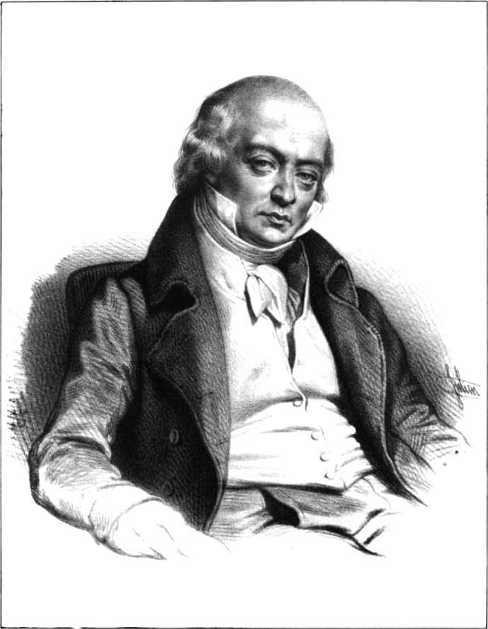 Drawing of Pierre-Jean de Béranger (1780-1857), French singer